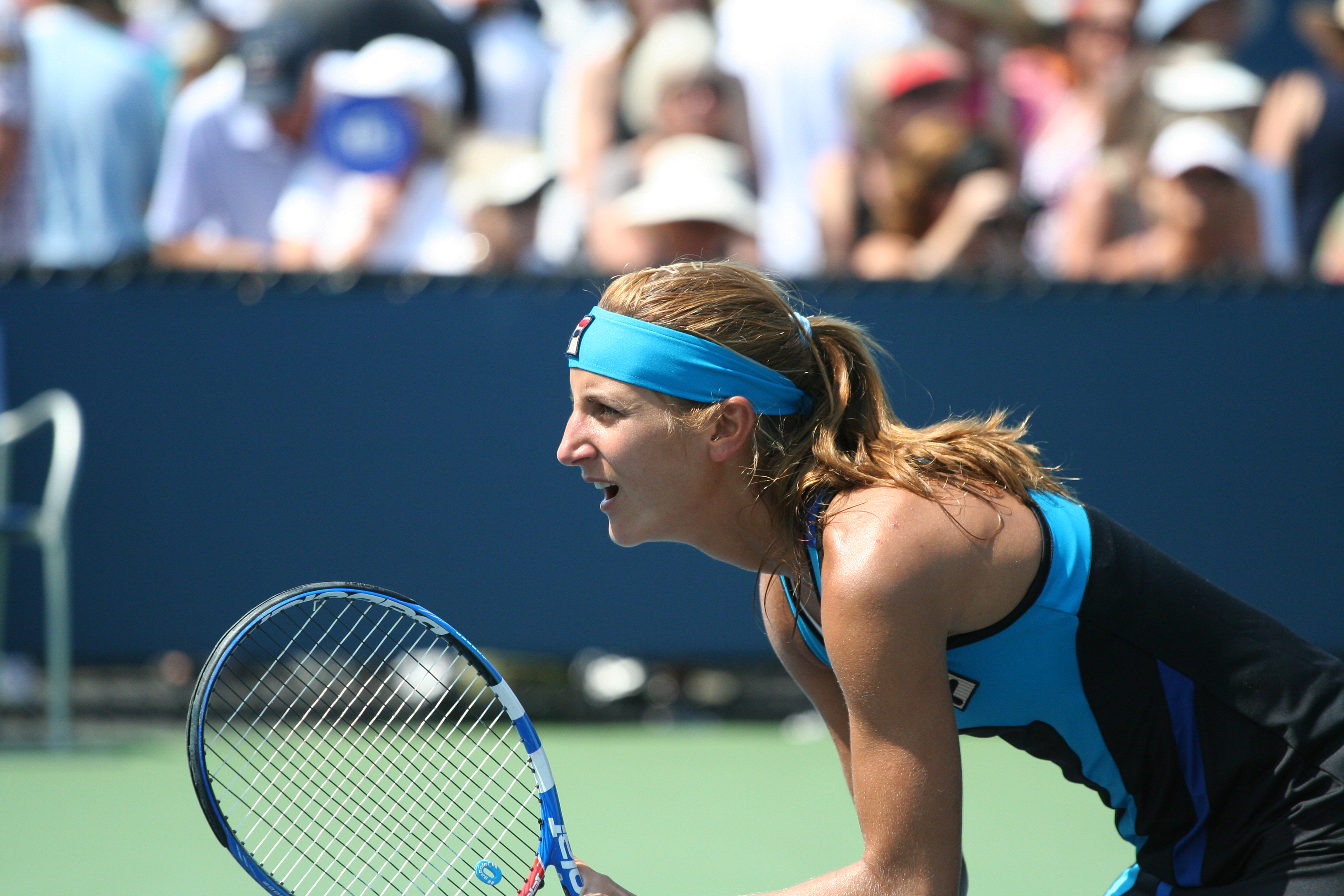 U.S. Open Sept. 2, 2010